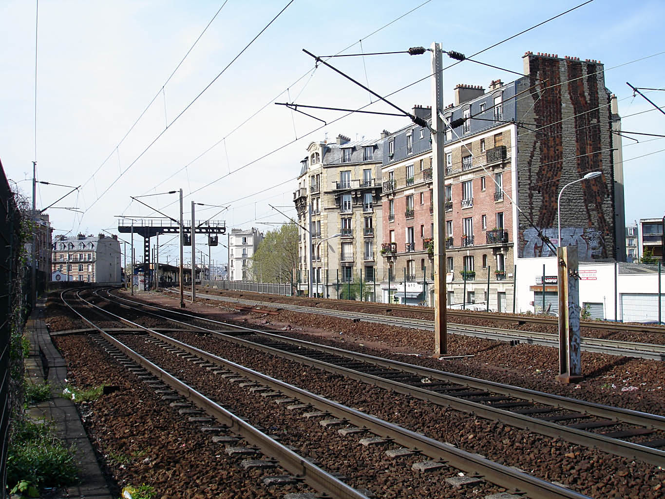 L'extrémité sud de la gare de Colombes, France.